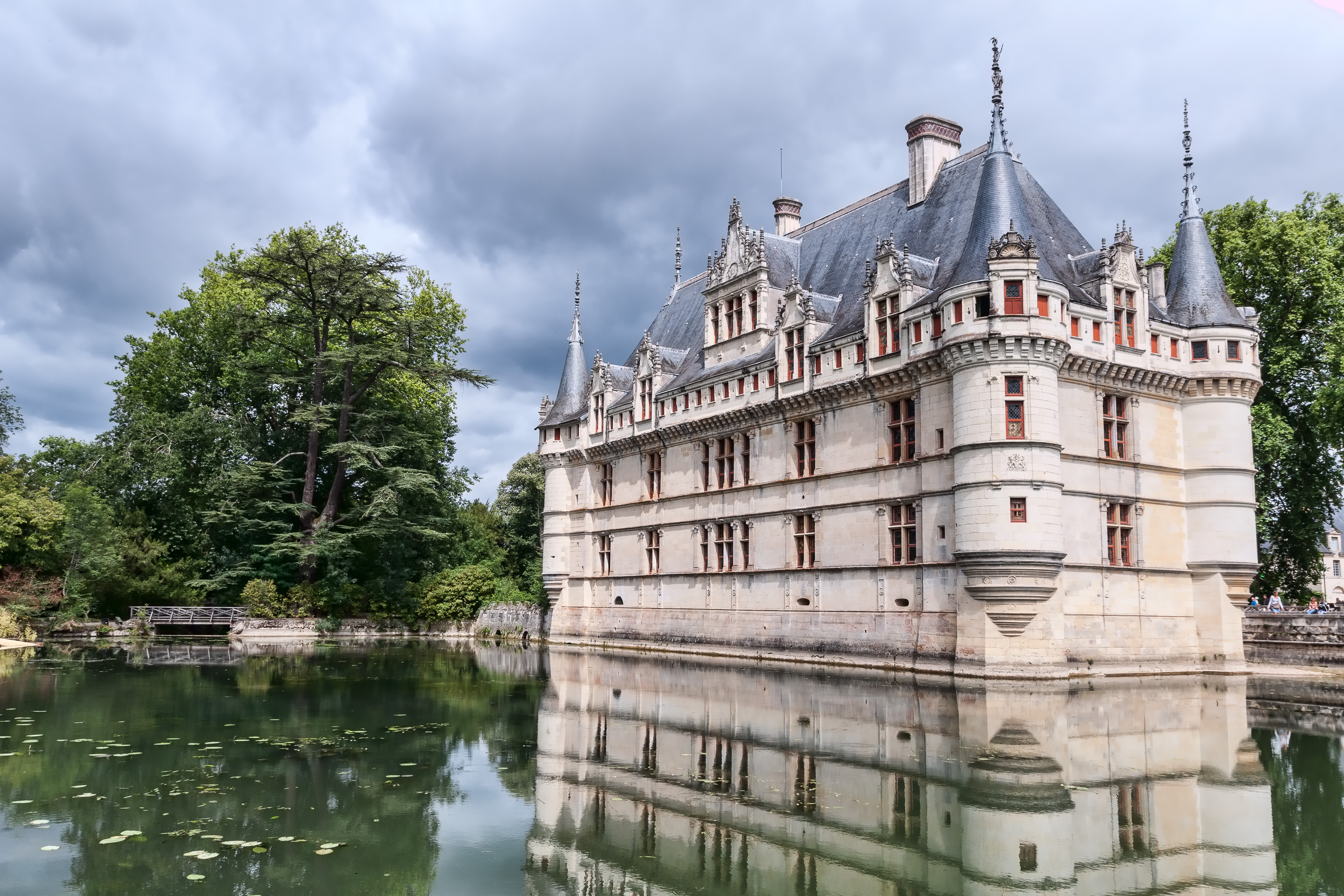 Château d'Azay-le-Rideau, Indre-et-Loire, France